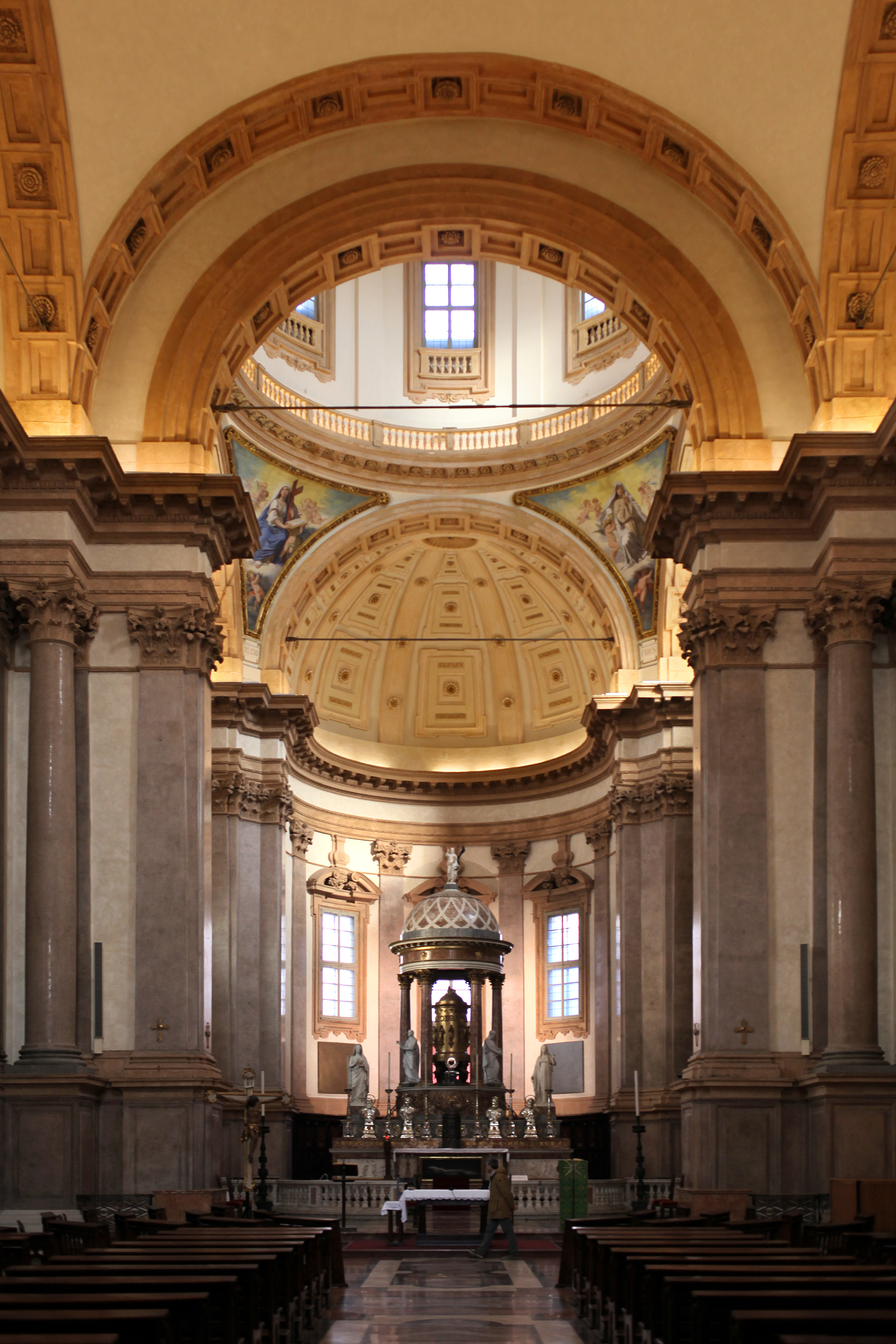 L'interno della chiesa di San Fedele a Milano, veduta generale con l'altare maggiore progettato da Pietro Pestagalli nel 1817